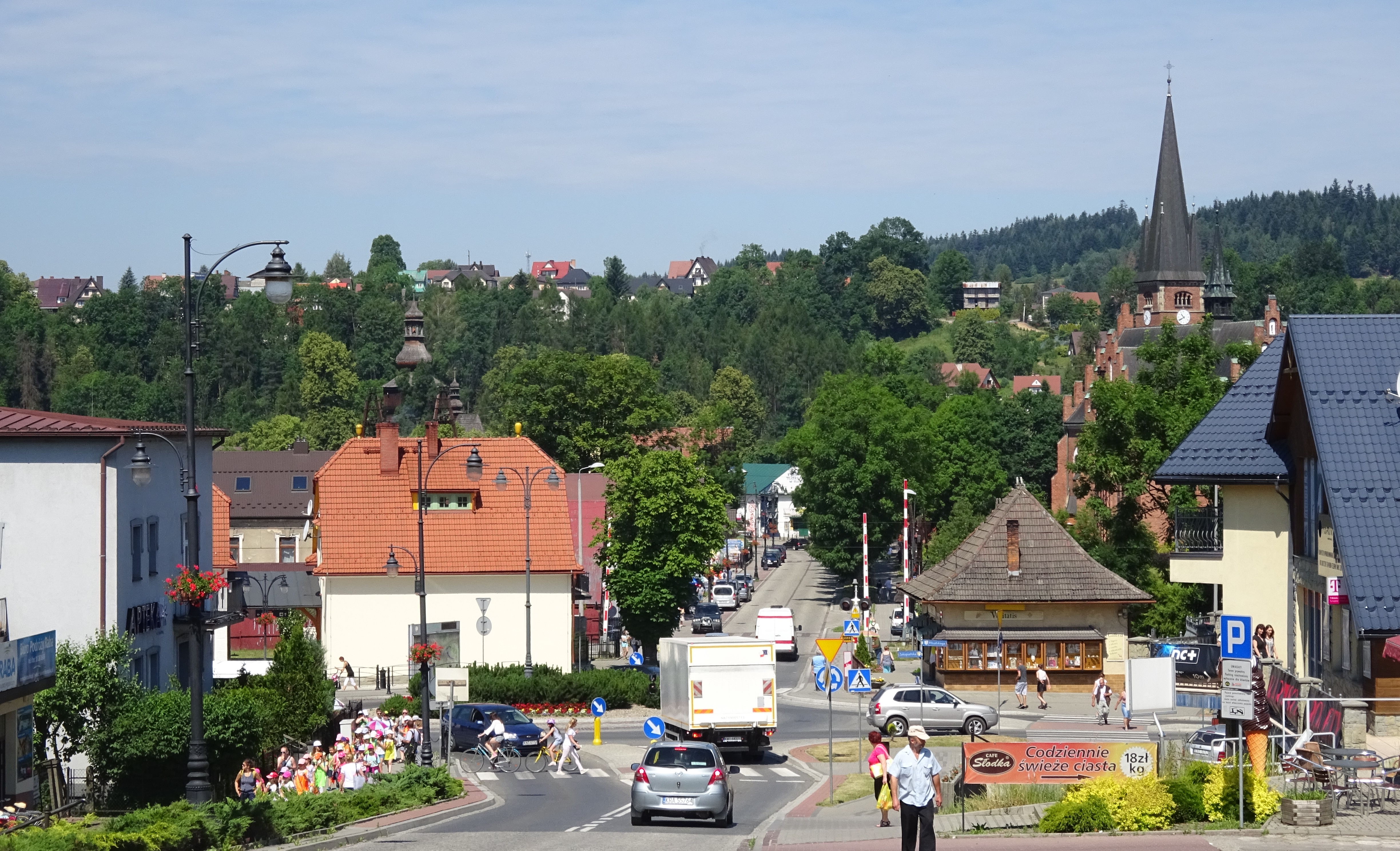 Widok na ulicę Władysława Orkana: od lewej - Dworzec PKP, nad nim wieża Starego Kościółka, pośrodku scena Teartu Rabcio i na prawo od niego Kościół pw. św. Marii Magdaleny.